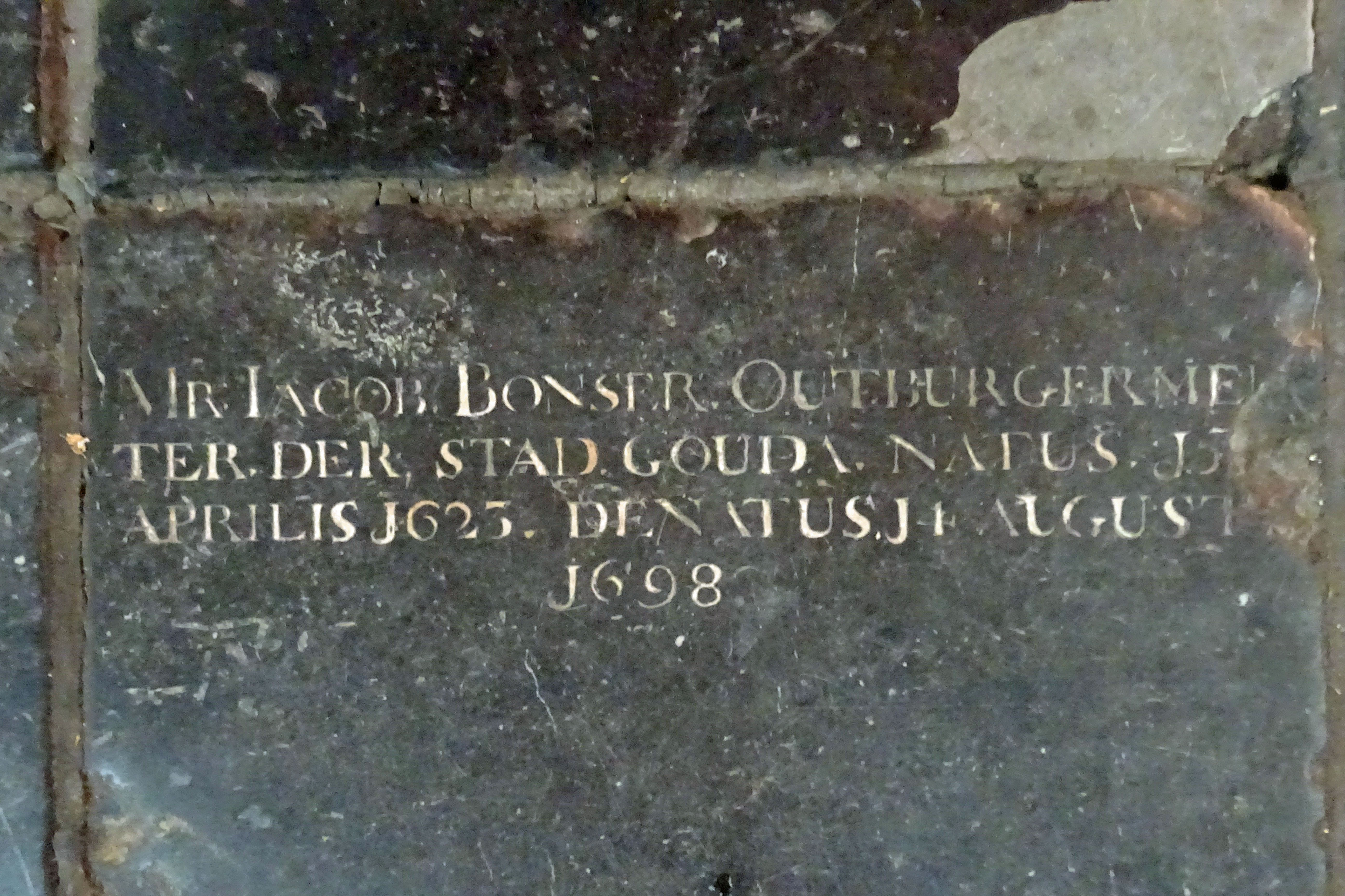 Grafzerk van Jacob Bonser (1623-1698, (oud)burgemeester in de Sint-Janskerk te Gouda